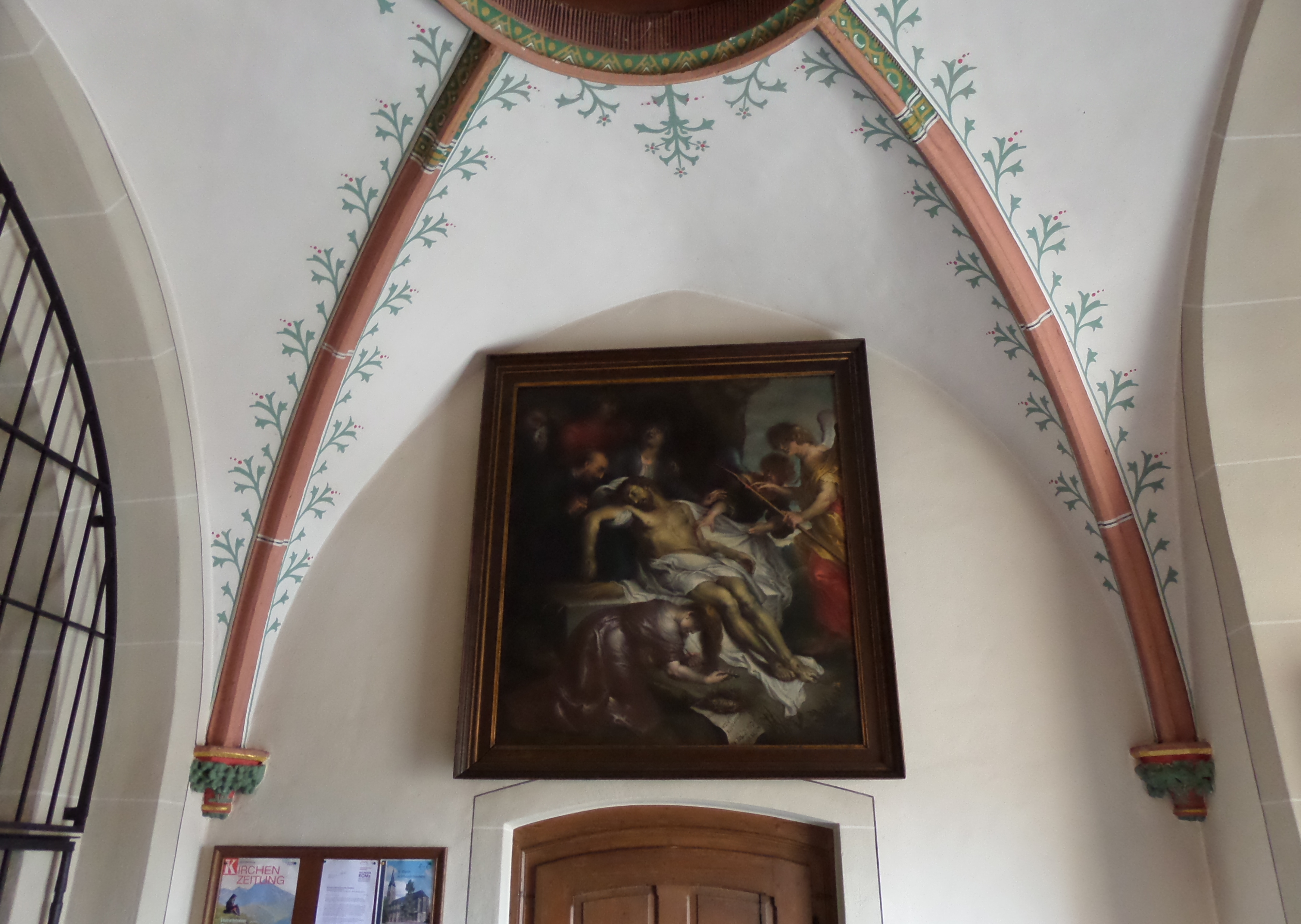 Friesheim, Pfarrkirche St. Martin. Schule Anthonis van Dyck, "Grablegung"